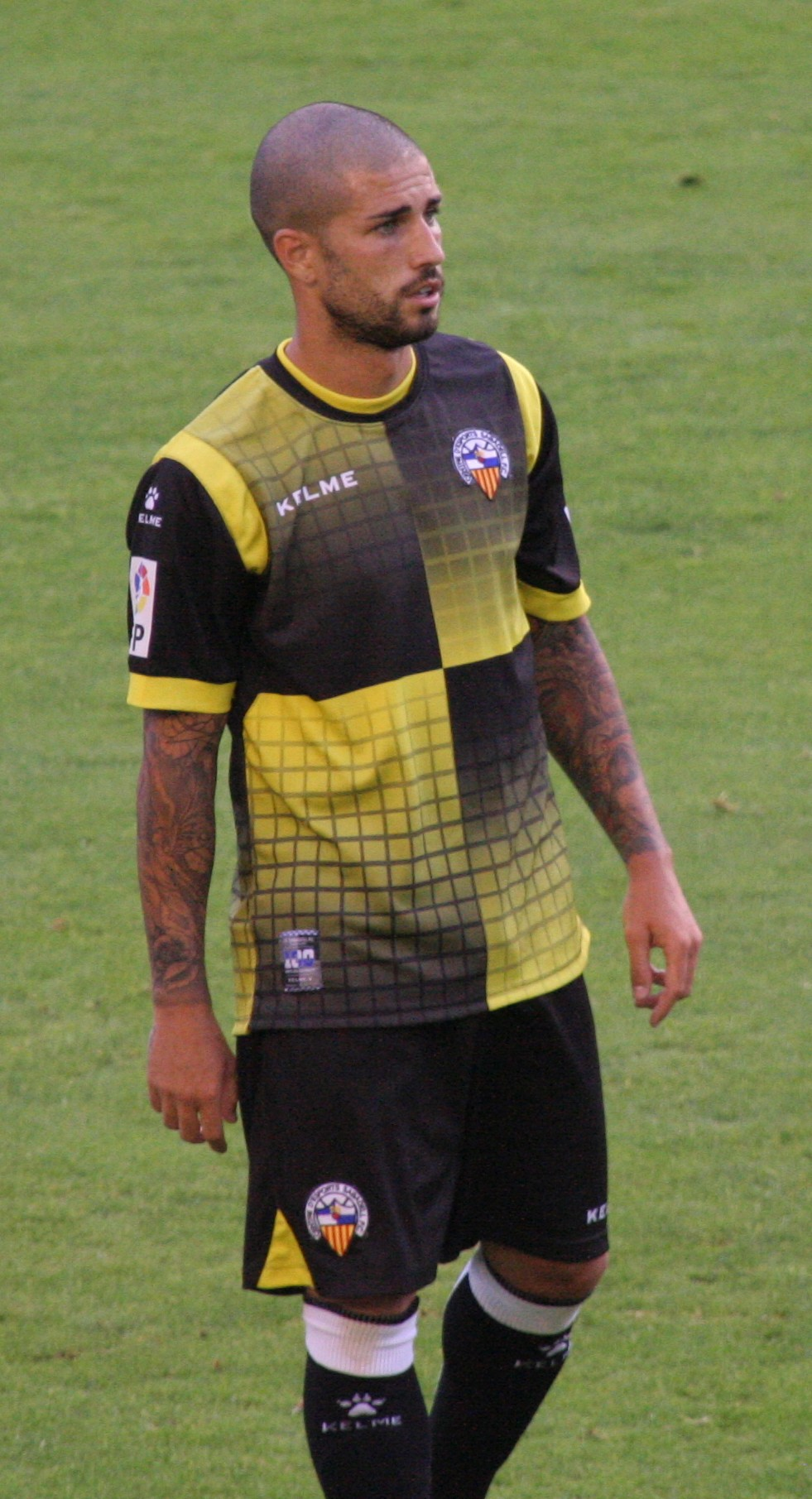 Aridai Cabrera